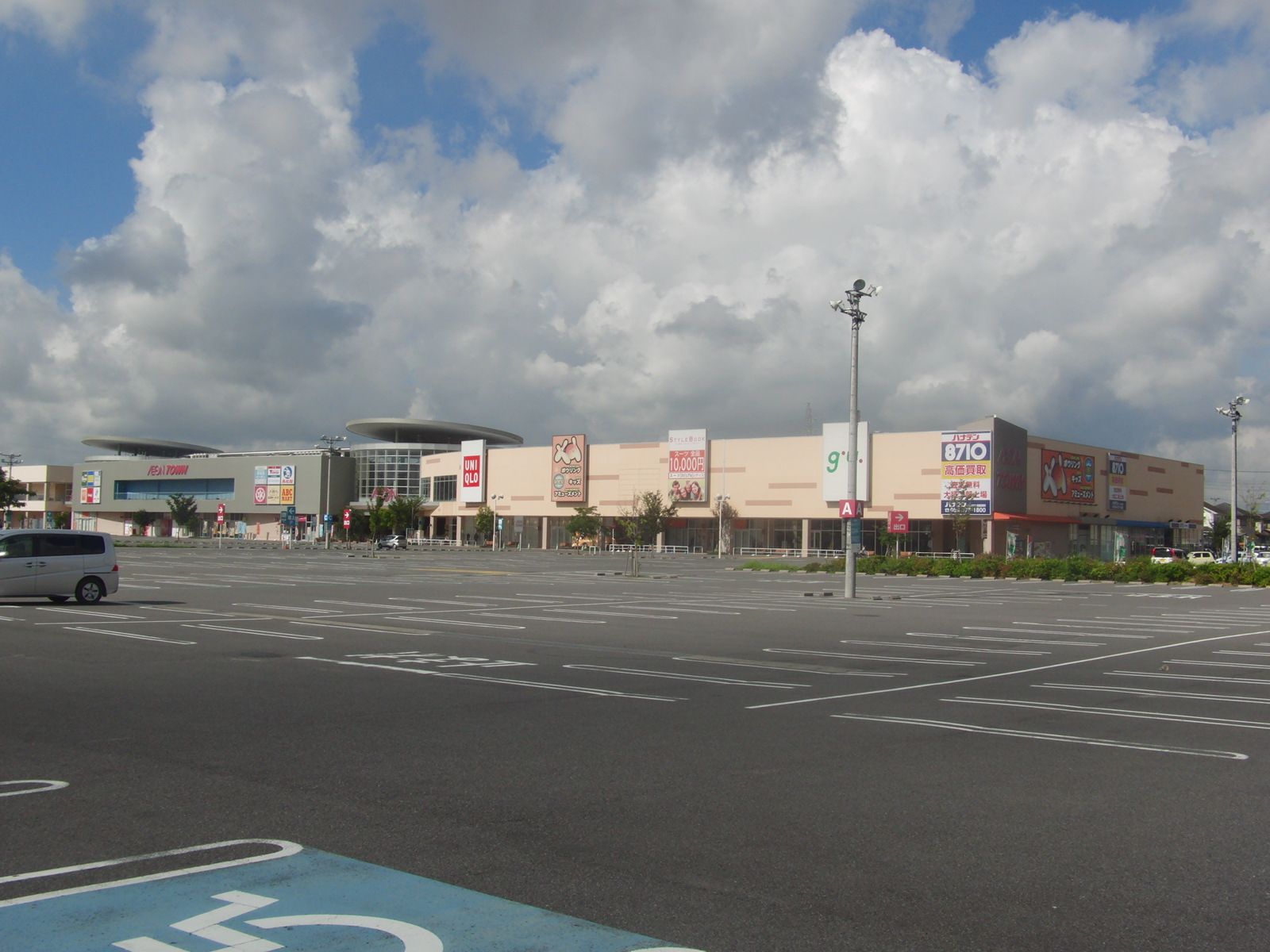 イオンタウン鈴鹿を撮影